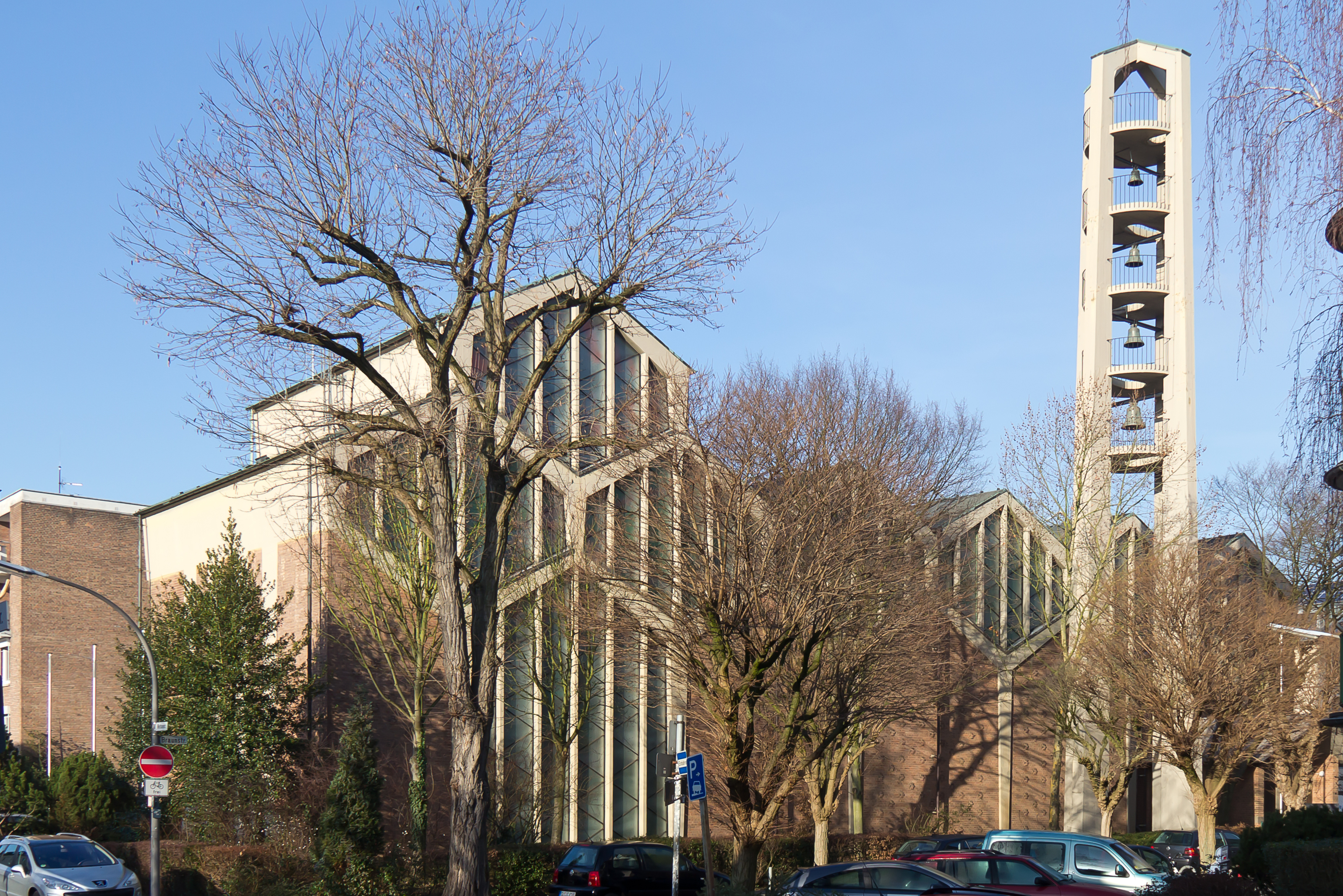 Denkmalgeschützte Kirche St. Joseph in Köln-Braunsfeld. Architekten: Rudolf Schwarz und Josef Bernard, Bauzeit: 1952-55.